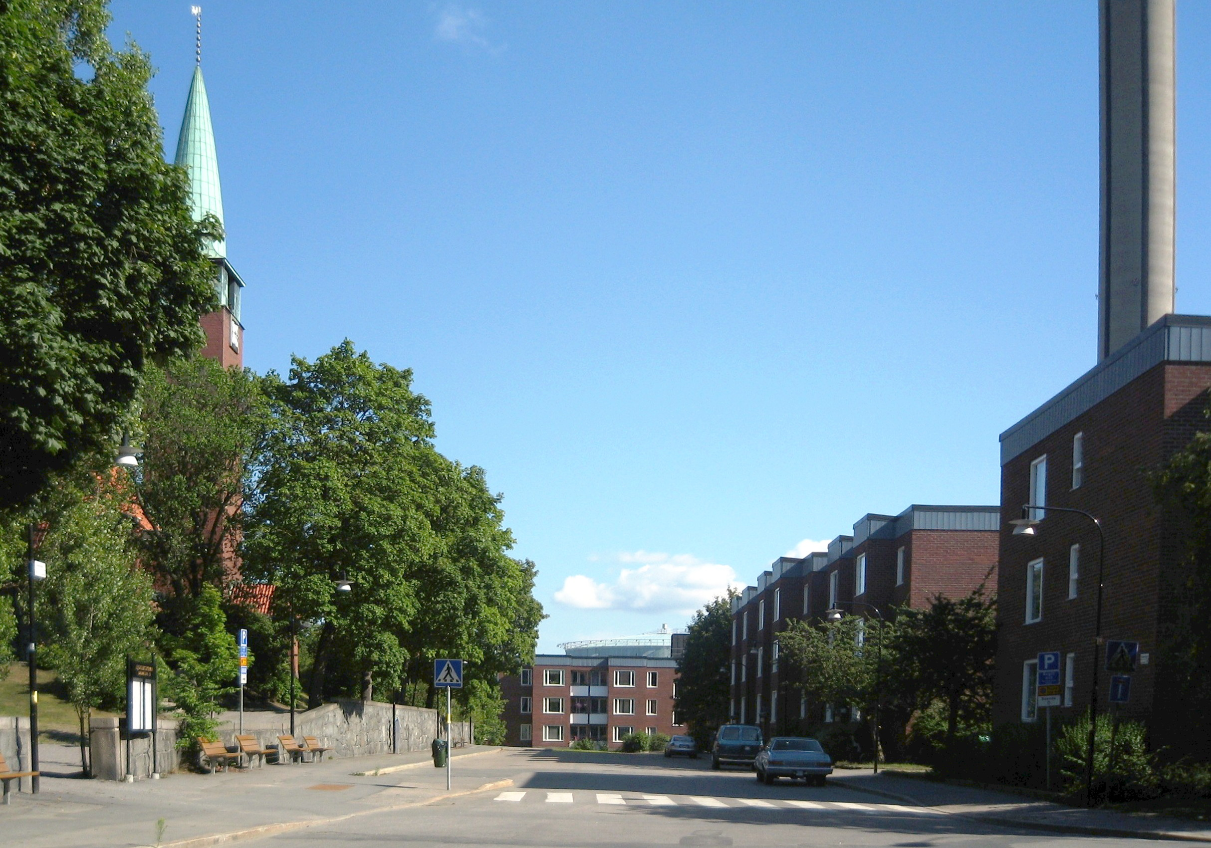 Hjorthagen. Bostadshus ritade av Backström & Reinius